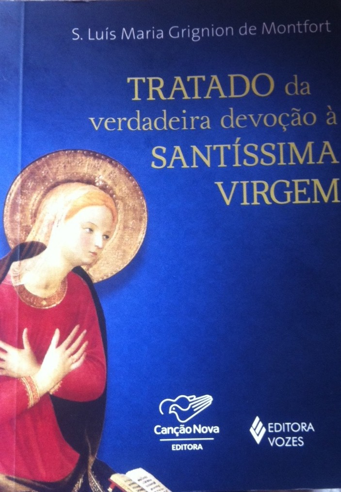 Tratado de Verdadeira devoção